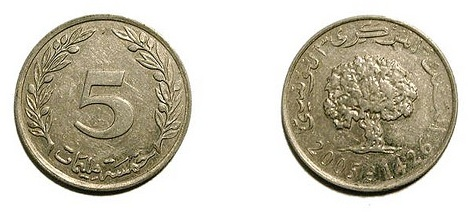 Pièce de 5 millimes - pièce de monnaie Tunisienne